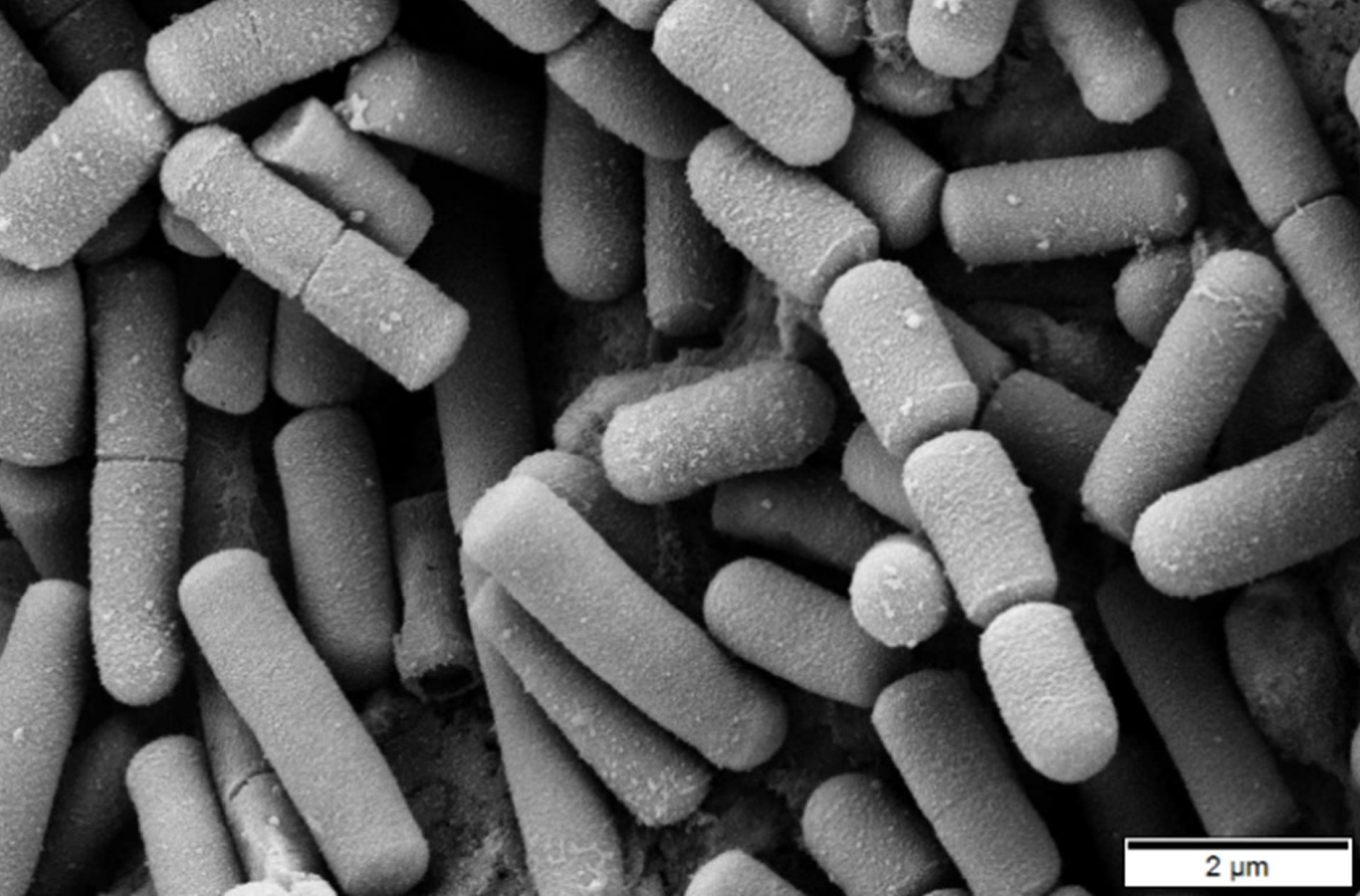 Bacillus cereus, SEM image